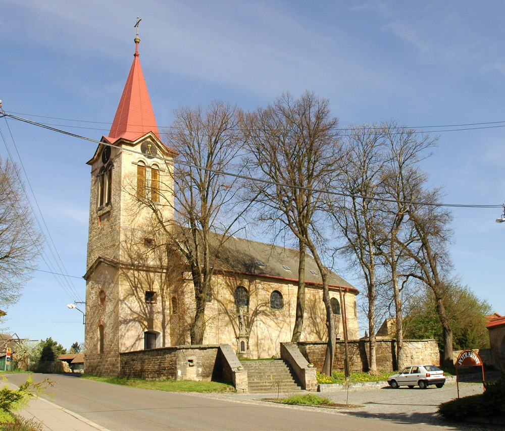 Kostel sv. Prokopa v Hořiněvsi, okres Hradec Králové